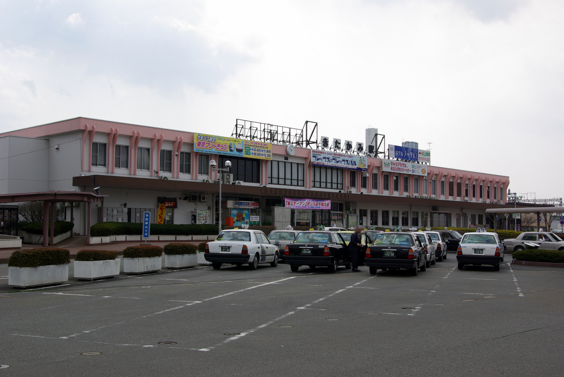 東日本旅客鉄道株式会社東北本線、北上線他北上駅